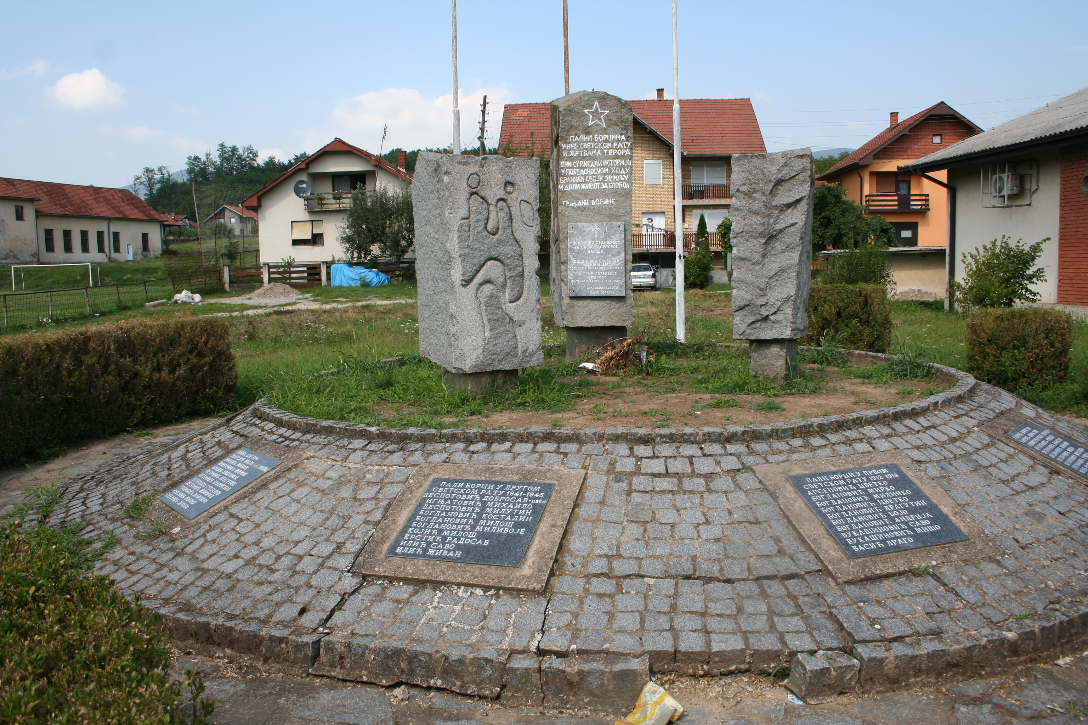 Spomenik borcima i žrtvama oslobodilačkih ratova, Donja Borina